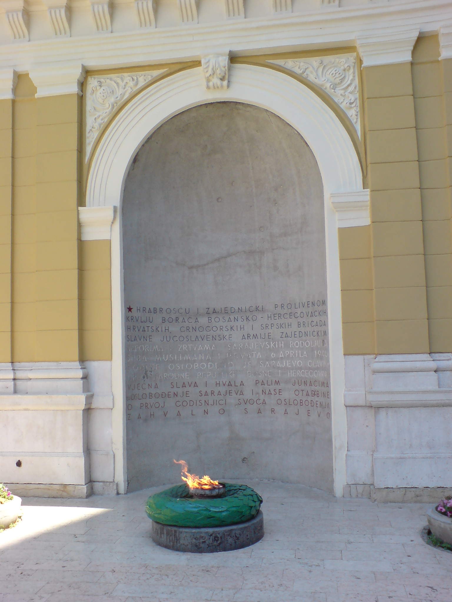 Eternal Flame momunent, central Sarajevo